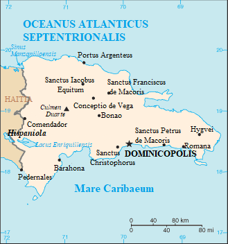 Tabula Rei publicae Dominicianae.